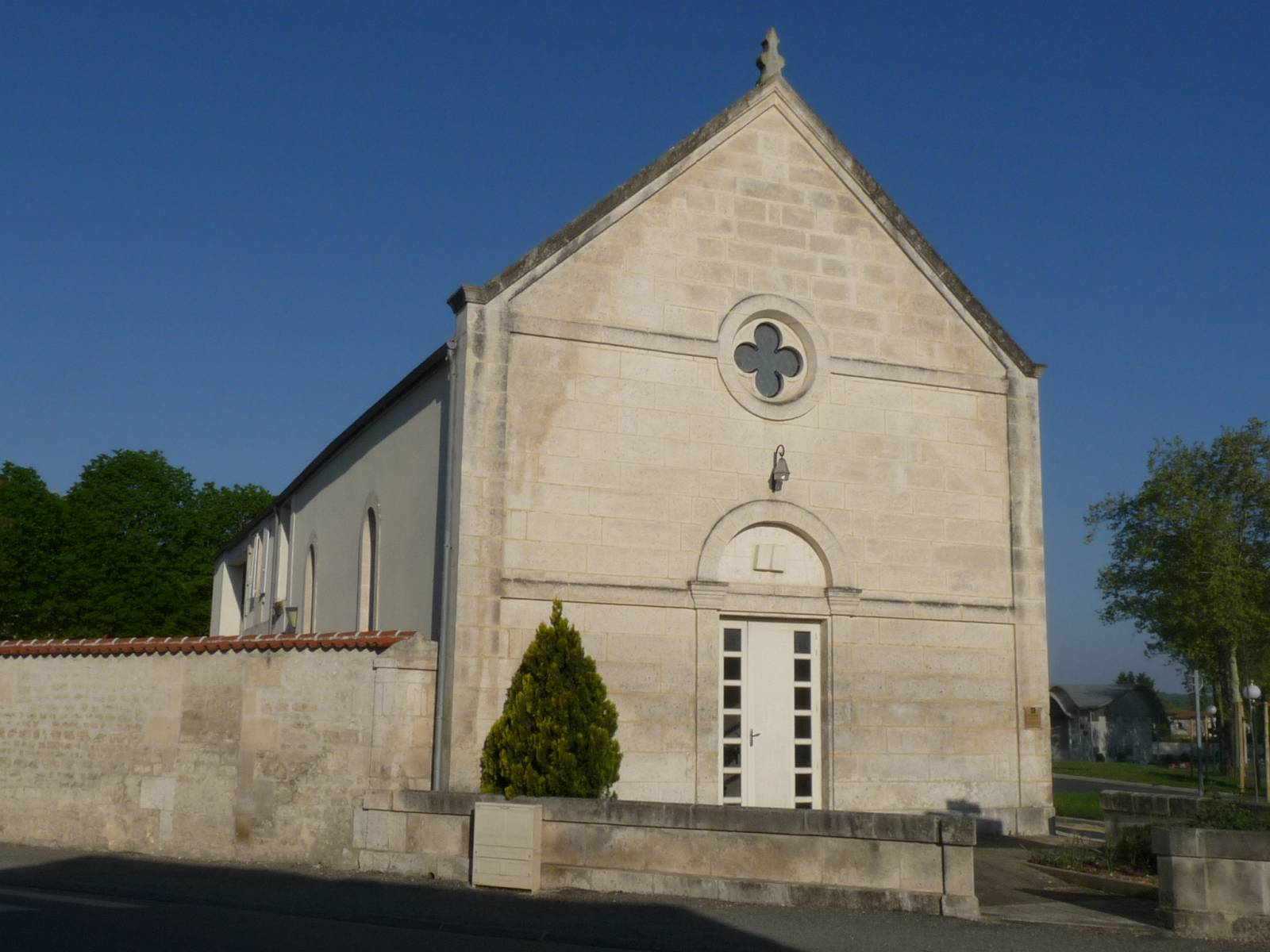 Temple protestant de Rouillac, Charente, France